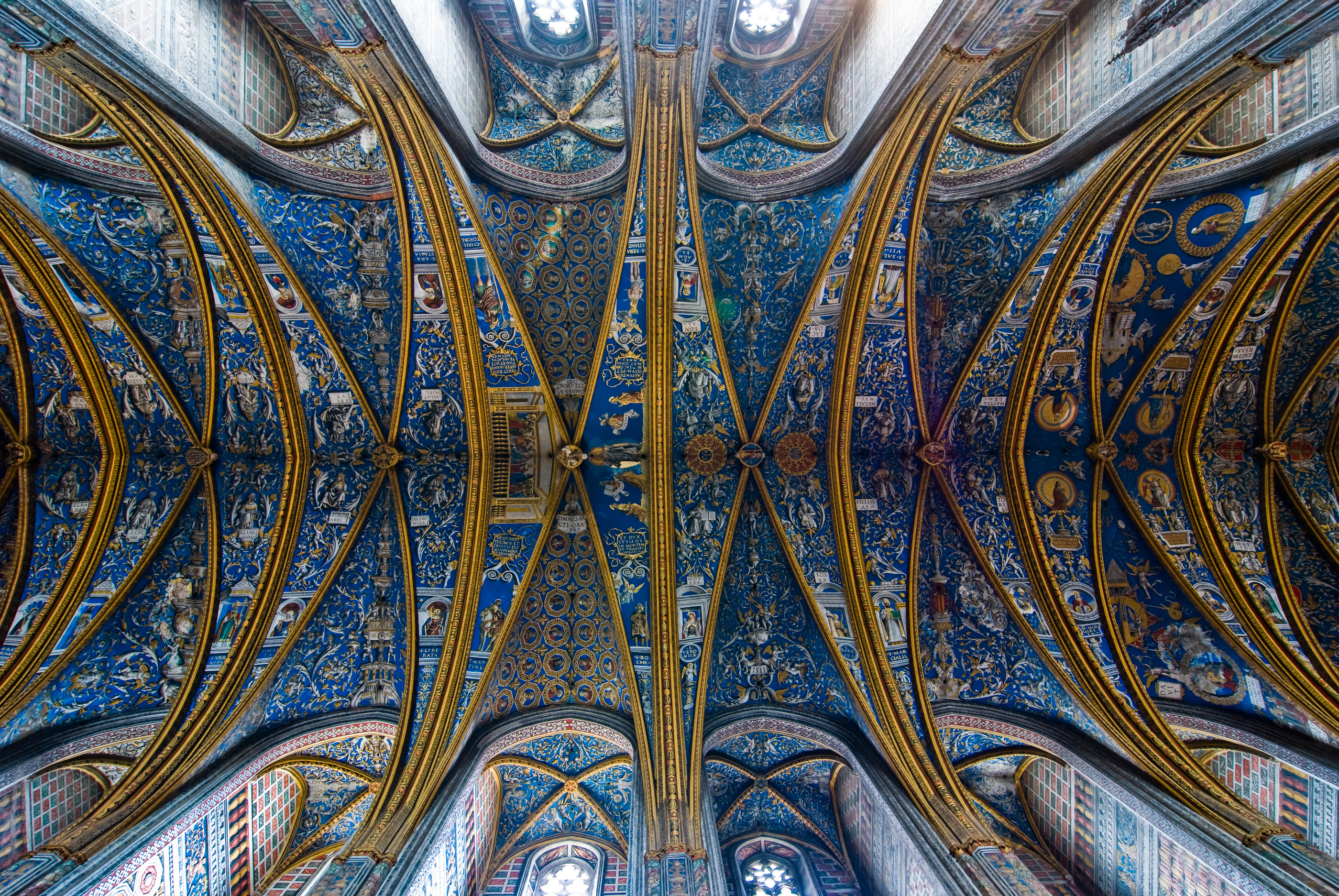 Voûtes peintes de la cathédrale (Cathédrale Sainte-Cécile, Albi)